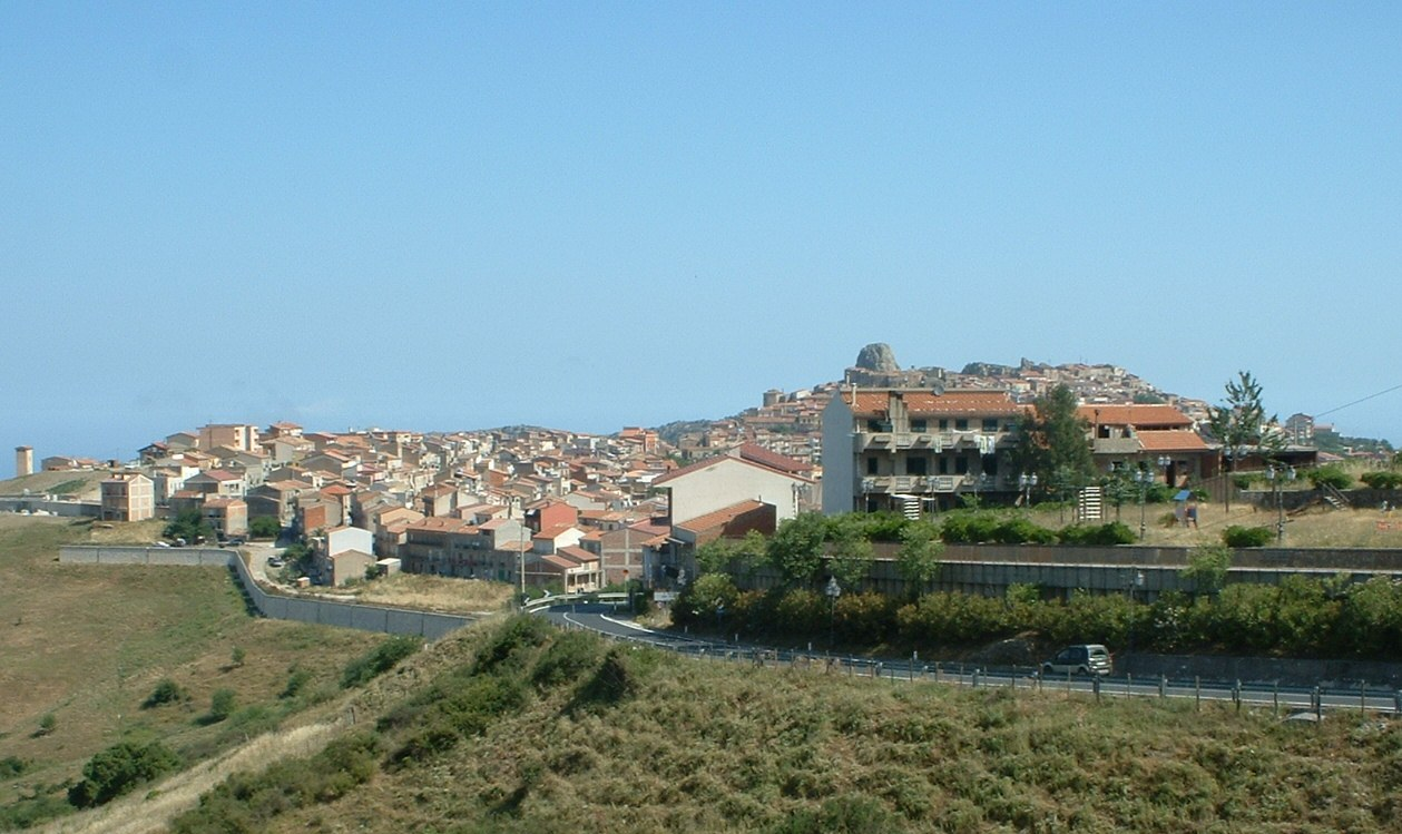 San Fratello (ME), Panorama